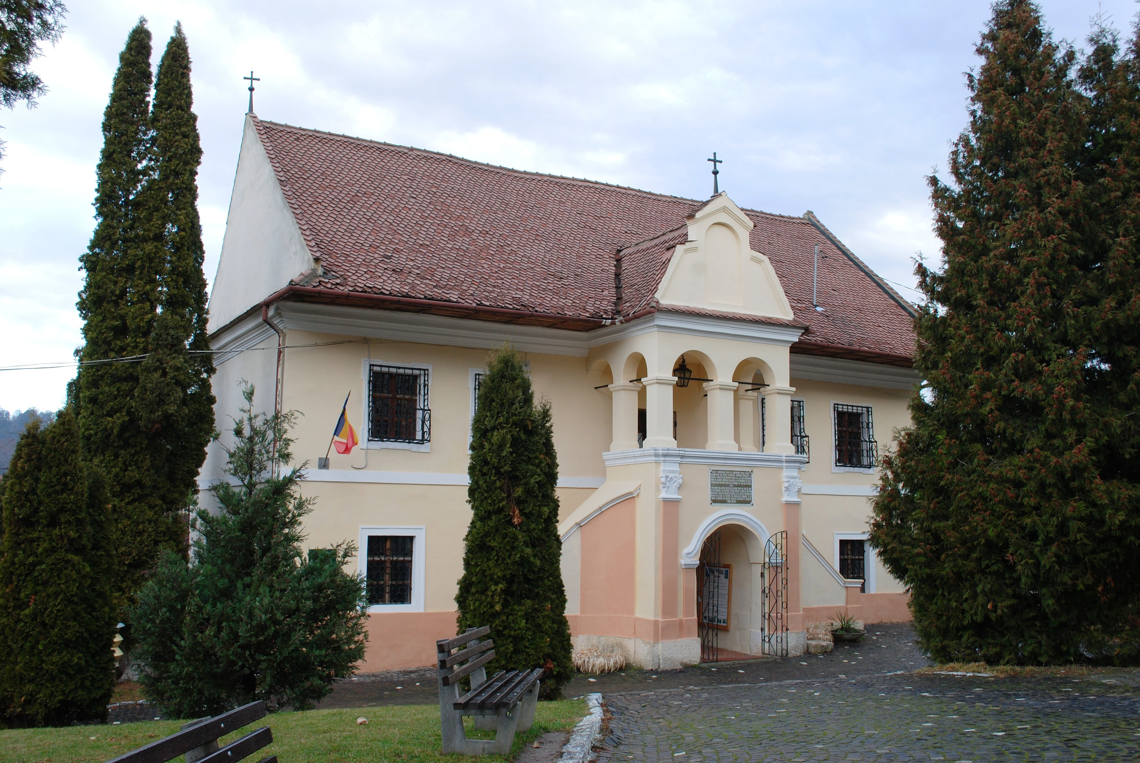 Fosta școală românească, azi muzeu, 1495,1597, 1760 - 1761 02